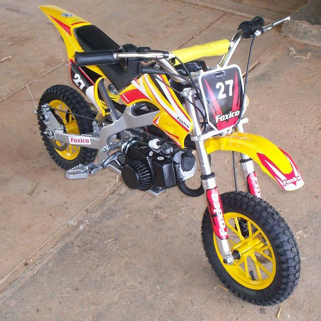 A mini Pocketbike dirt-bike. Photograph taken by myself, January 16, en:2007.